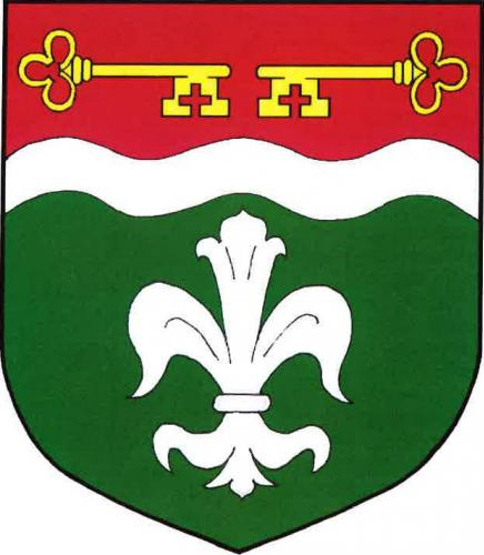 znak, Lhoty u Potštejna, okres Rychnov nad Kněžnou